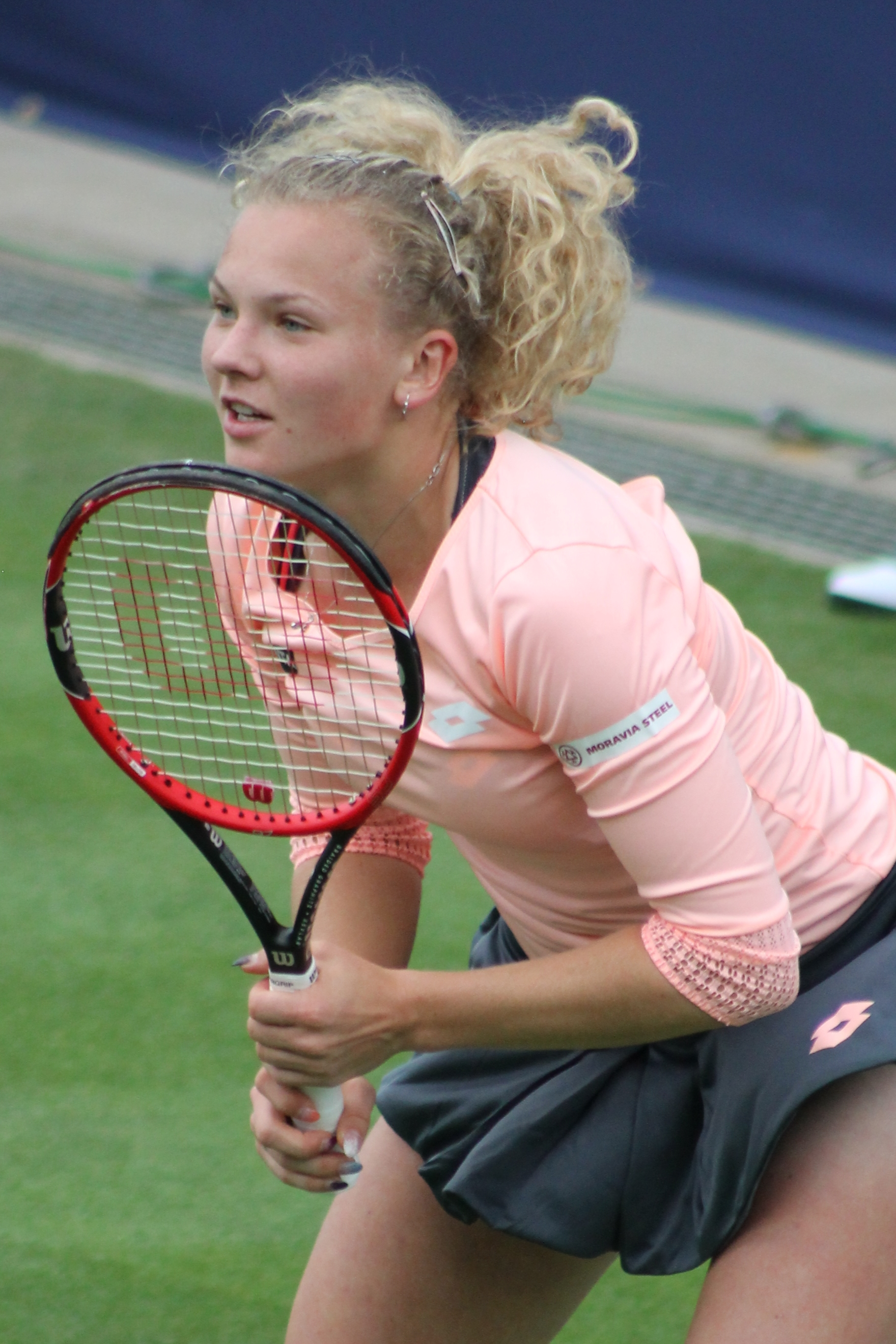 Kateřina Siniaková BM16 (2)